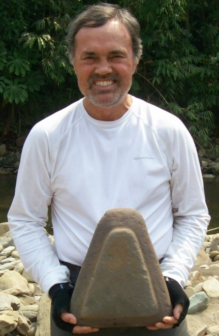 Sixto Paz Wells, autor y conferenciante peruano sobre extraterrestres.